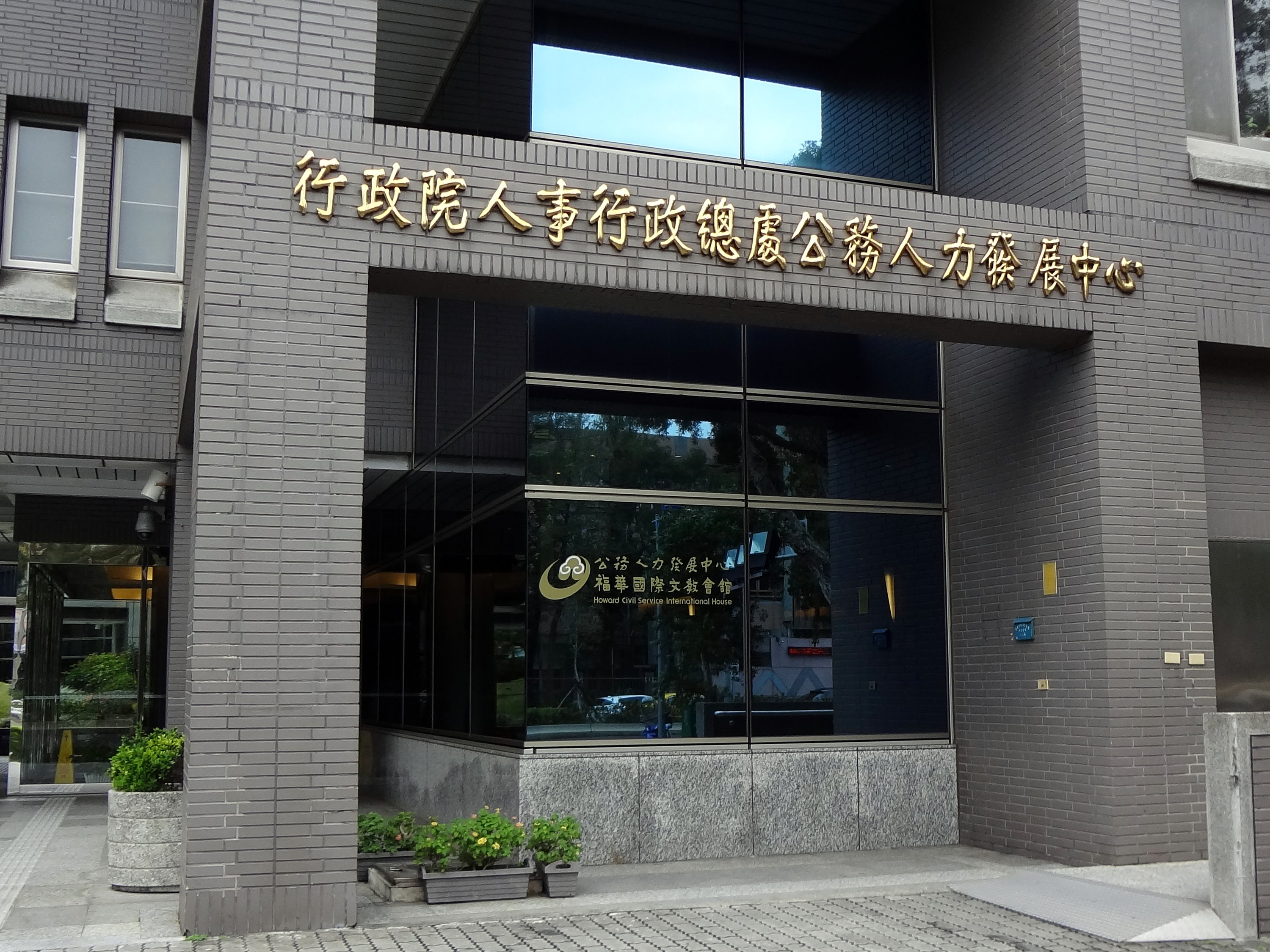 公務人力發展中心福華國際文教會館，係行政院人事行政總處公務人力發展中心委託福華大飯店經營。